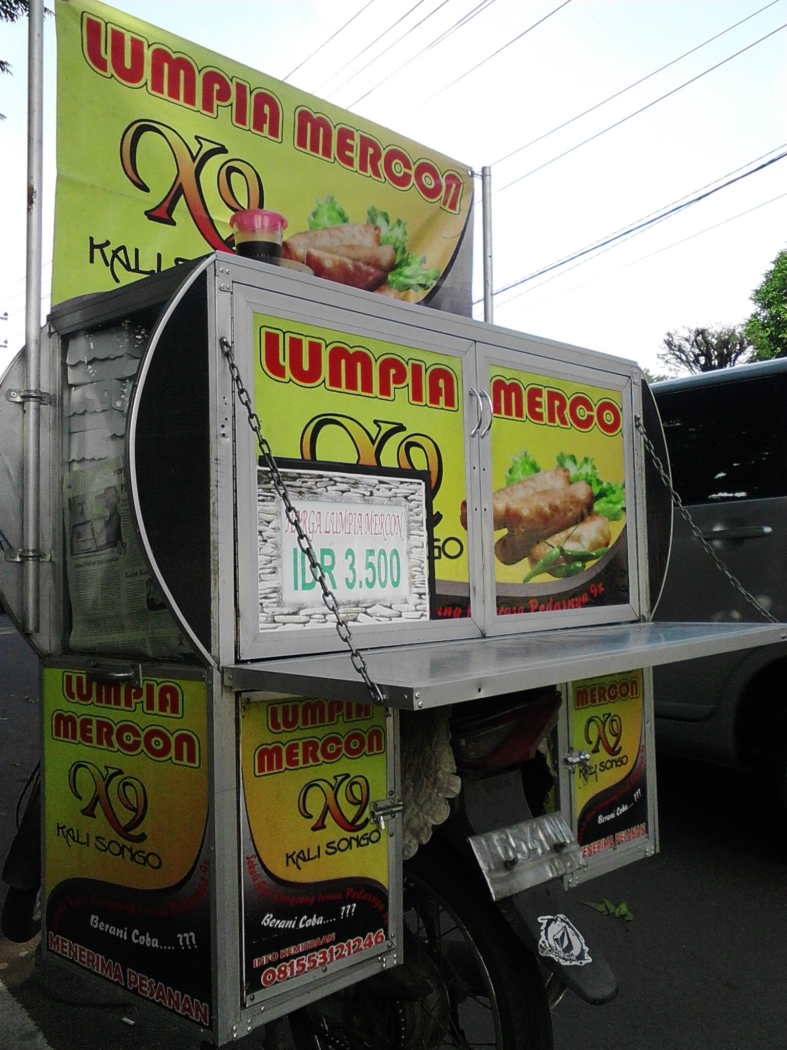 jajanan khas sidoarjo Lumpia Mercon